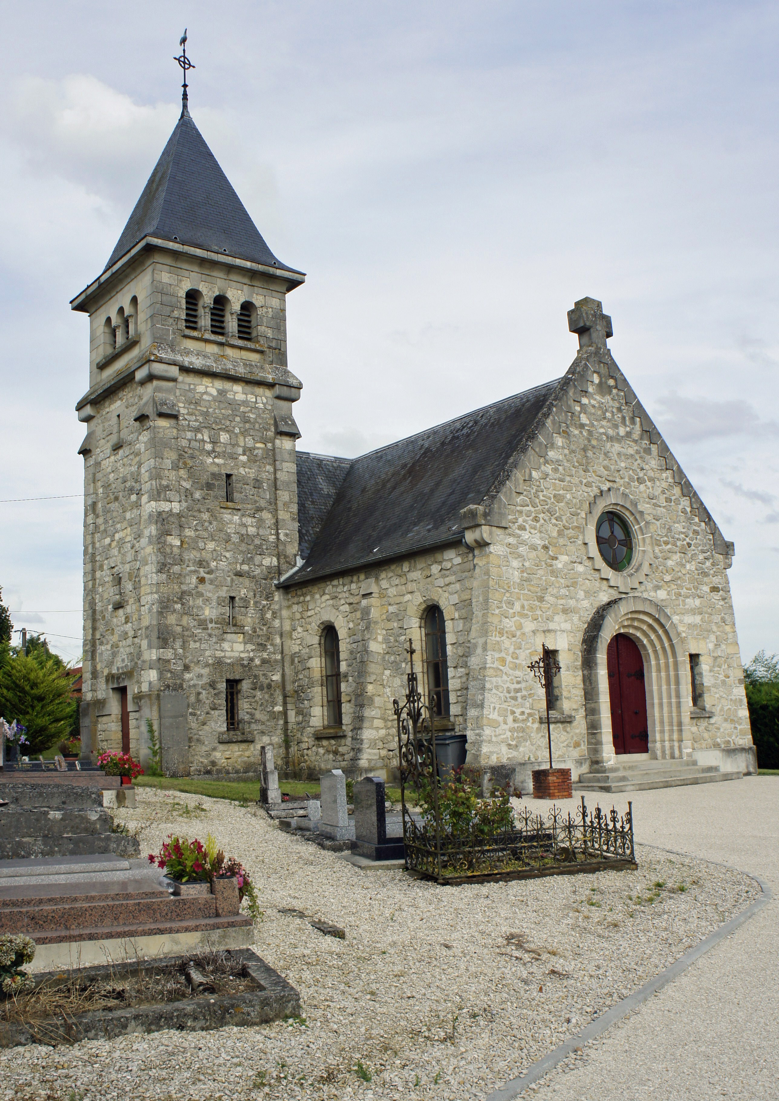 st-Eupraise-et-Clariset, son église entourée de son cimetière.